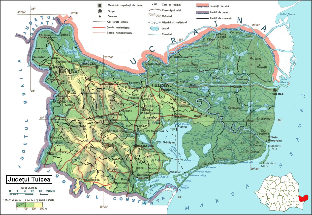 Harta județului Tulcea, după mai multe surse geografice, actualizate 2011.